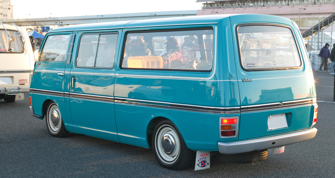 Nissan Caravan Long Delux ( VGE20 )